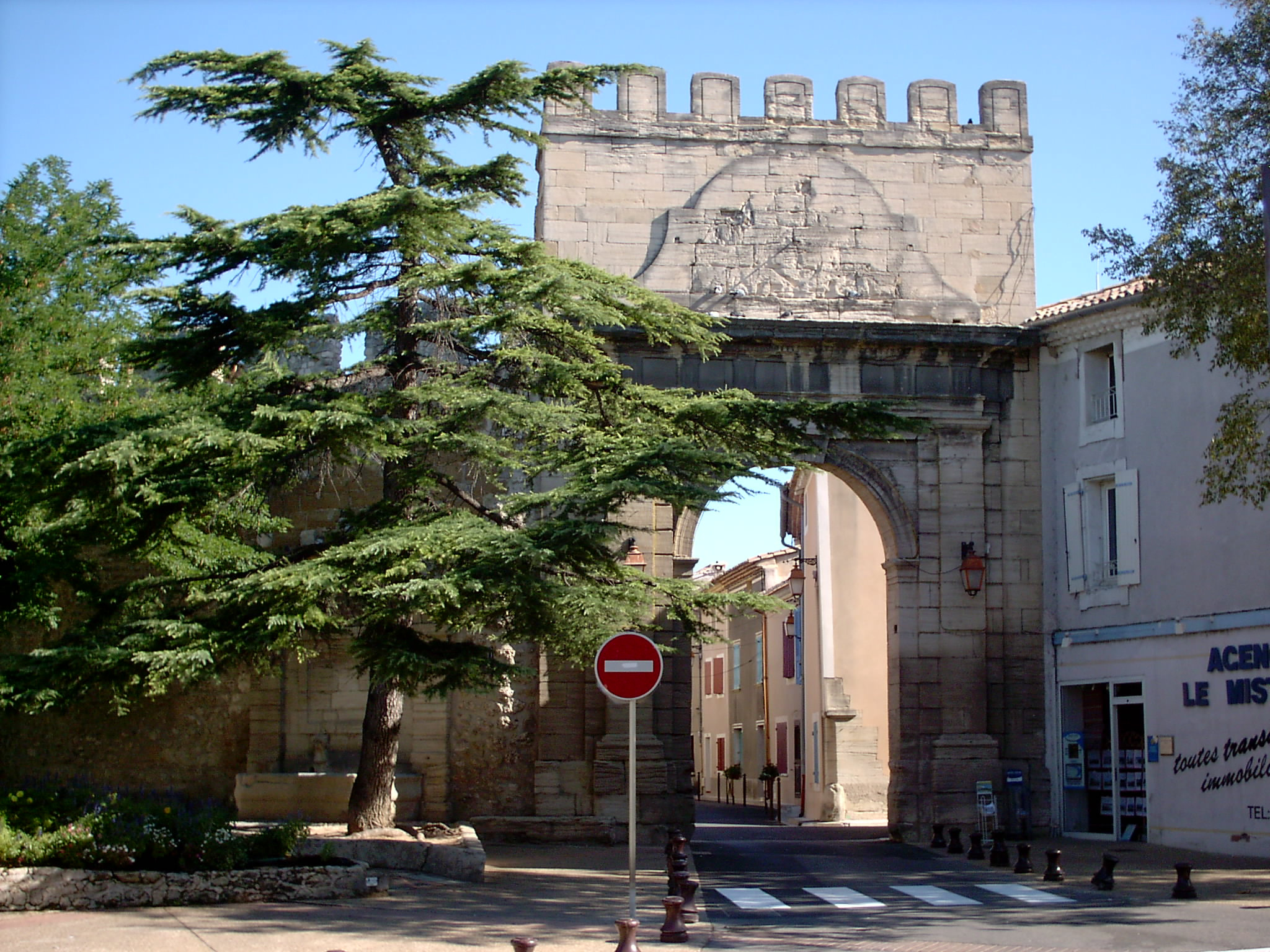 Porte d'Avignon à Monteux, vestiges des remparts de la ville